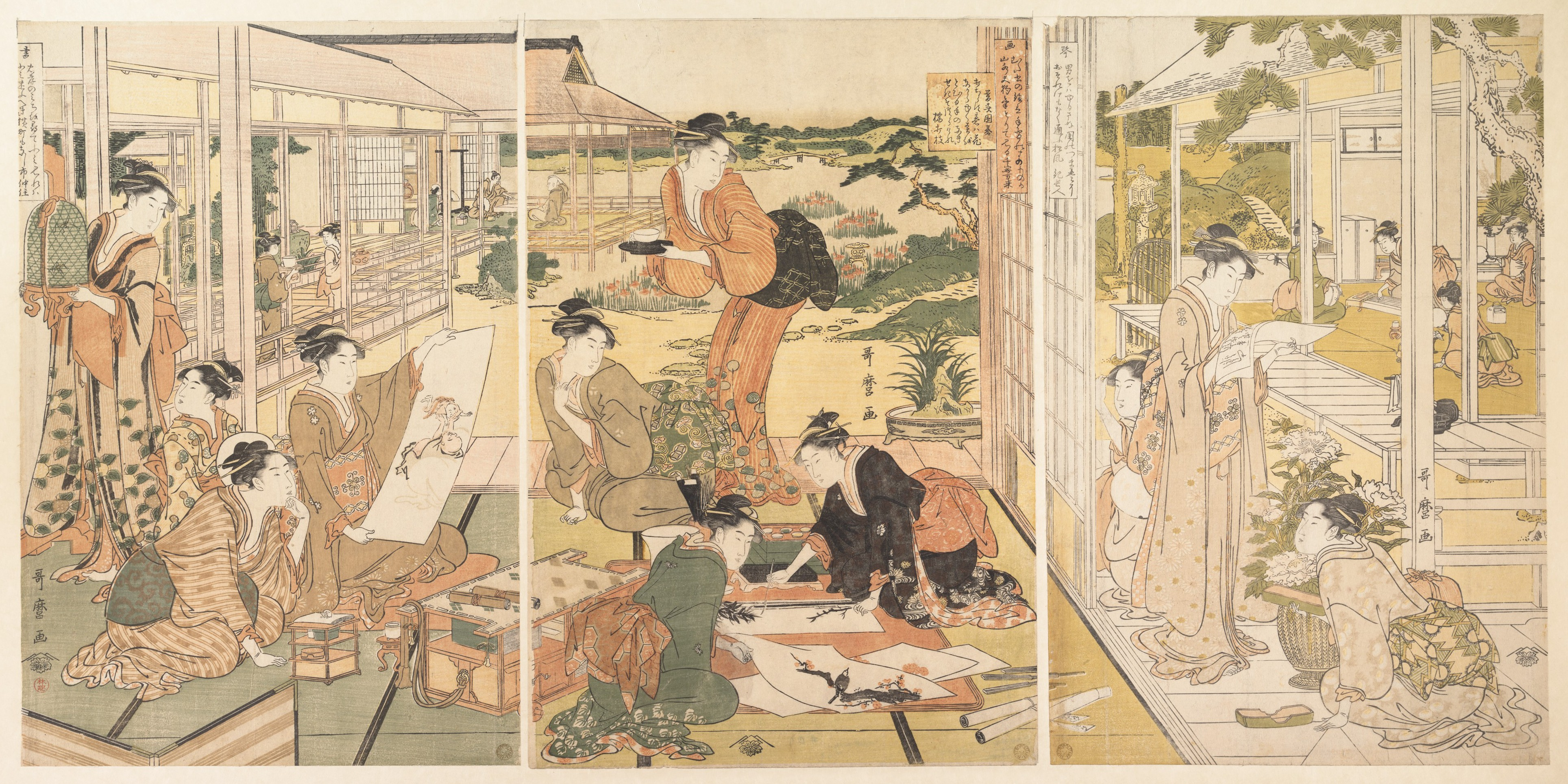 Japan; Print; Prints